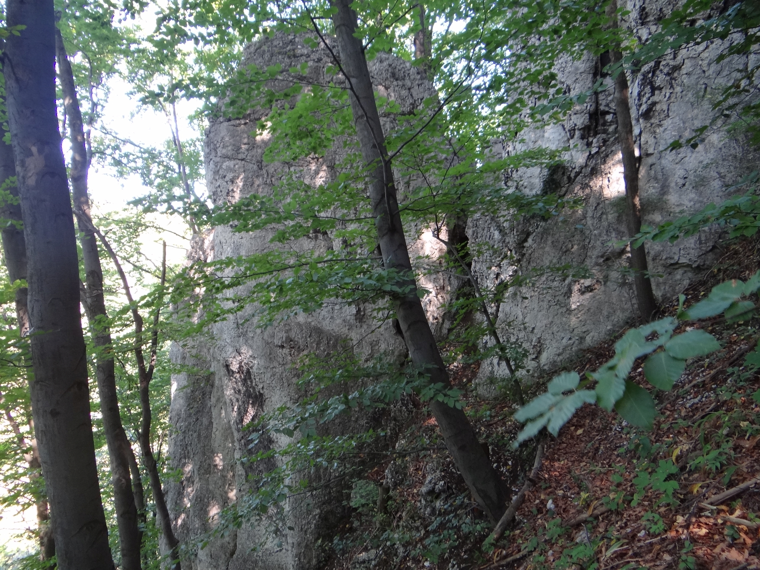 Skała poniżej Skały nad Źródłem w Dolinie Będkowskiej